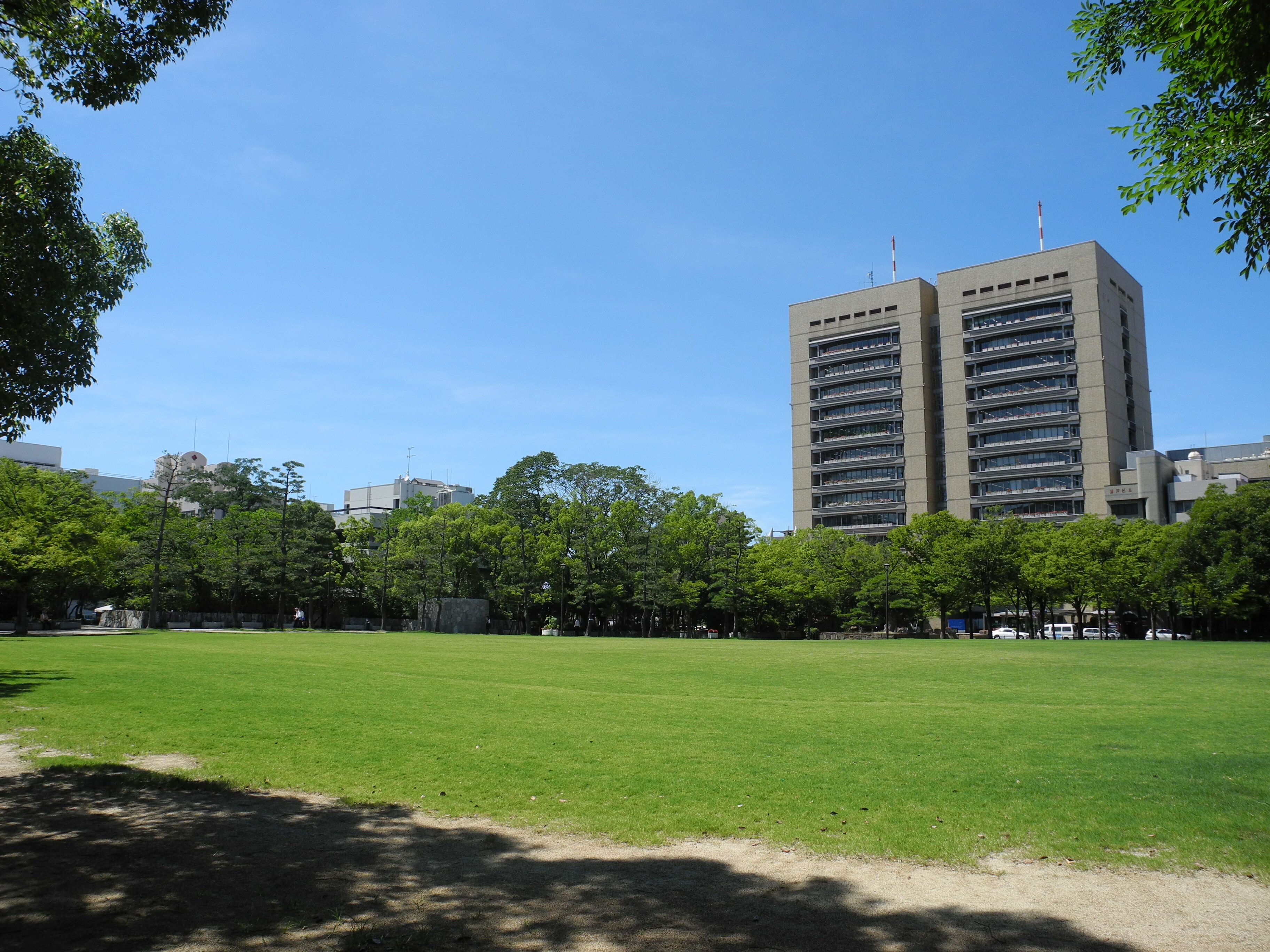 高松市立中央公園(香川県高松市)